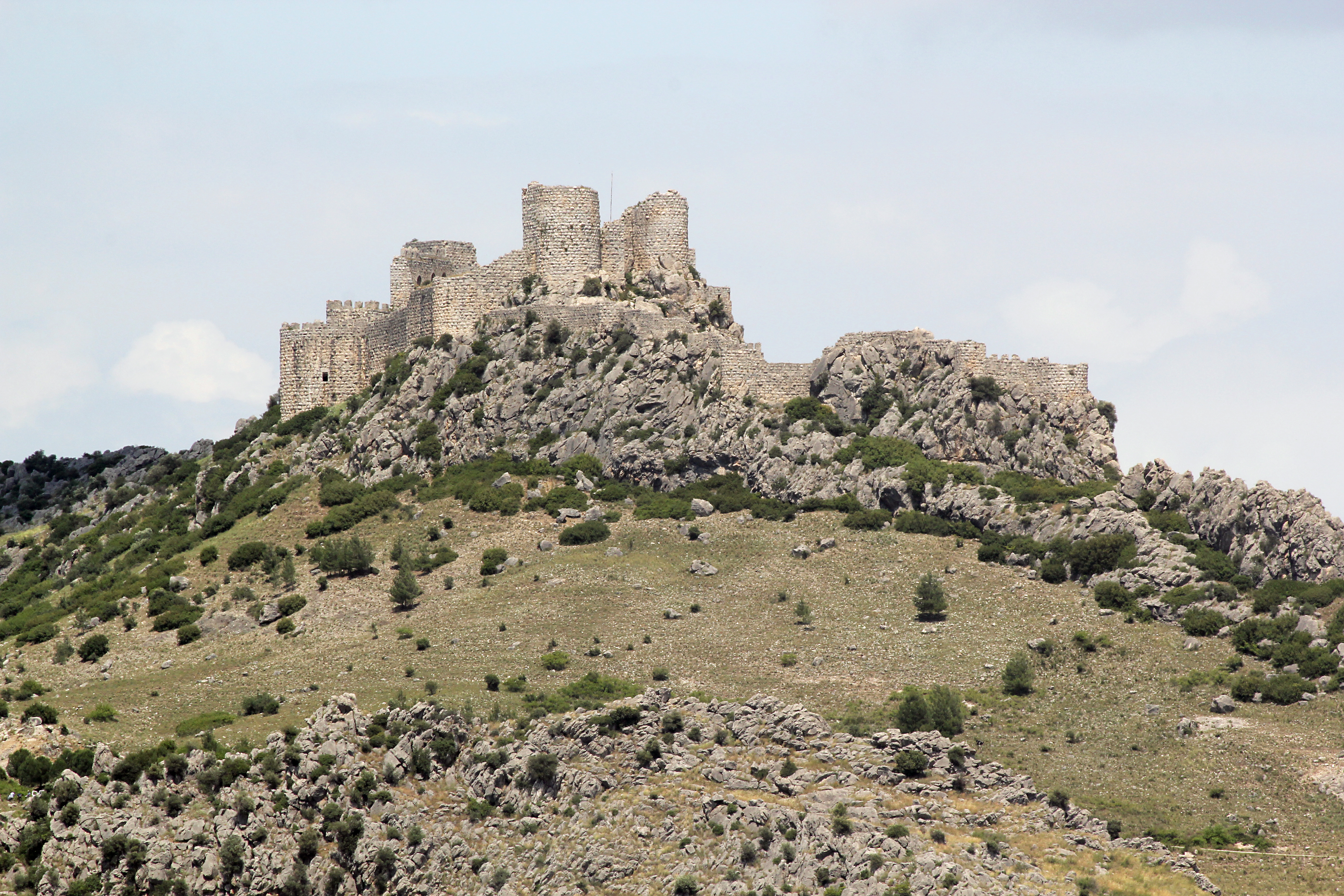 Yılankale, kleinarmenische Burg beim gleichnamigen Ort westlich Ceyhan, Südtürkei, von Süden